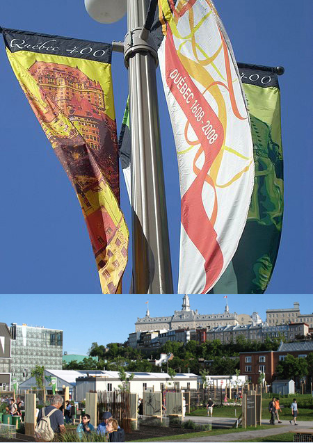 Montage photo pour le 400e anniversaire de Québec en 2008. Espace 400e au Bassin Louise et bannières du 400e.